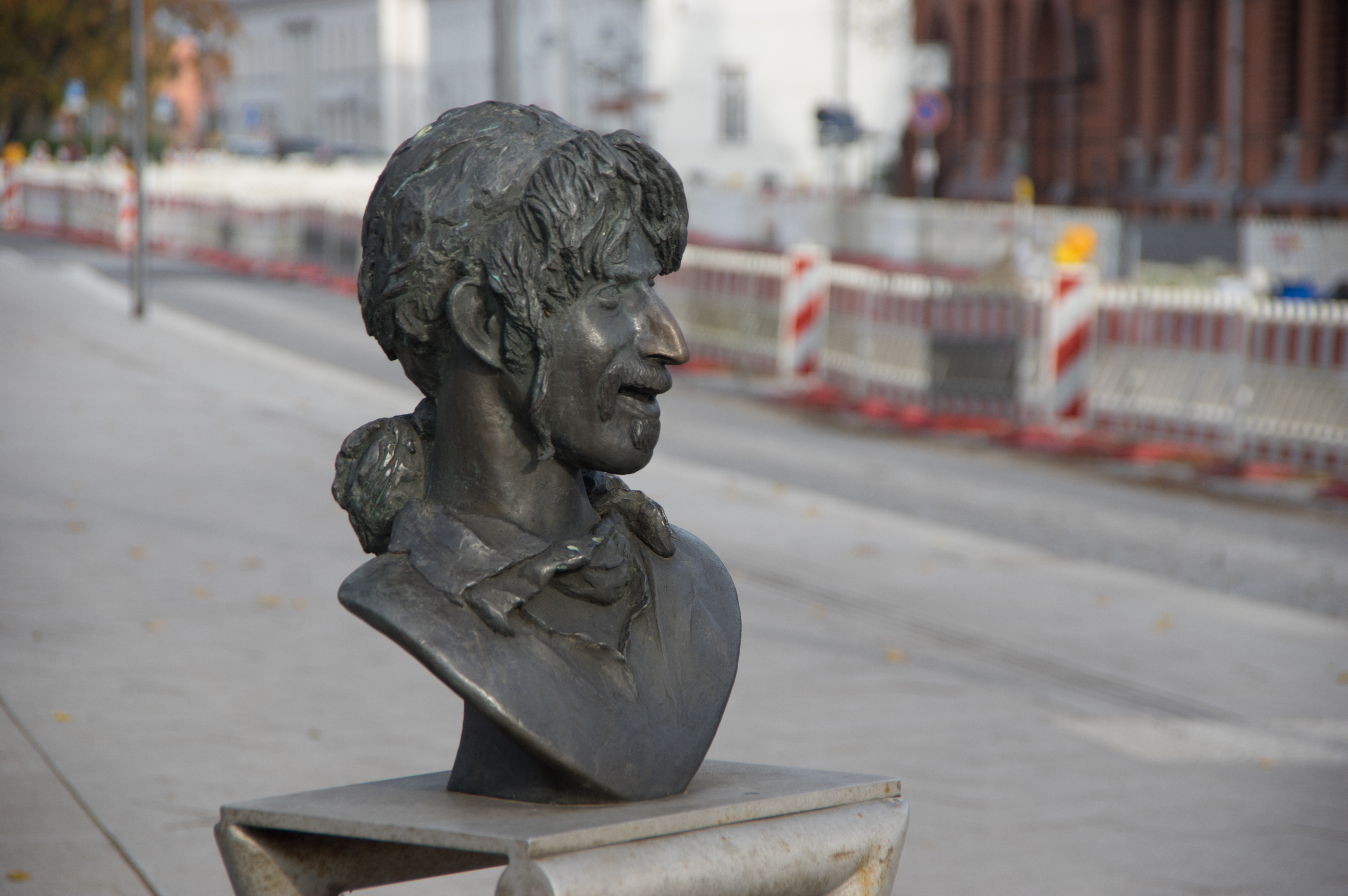 Bad Doberan in Mecklenburg-Vorpommern. Das Denkmal für Frank Zappa befindet sich am Park in Bad Doberan.